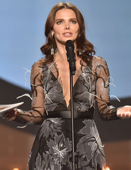 Премия Золотая маска - 2017 года